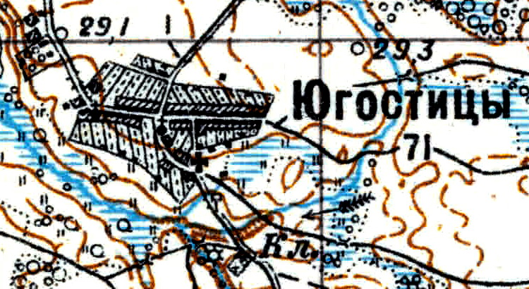 Топографическая карта Ленинградской области, квадрат Vc-29 (Батецкая), деревня Югостицы